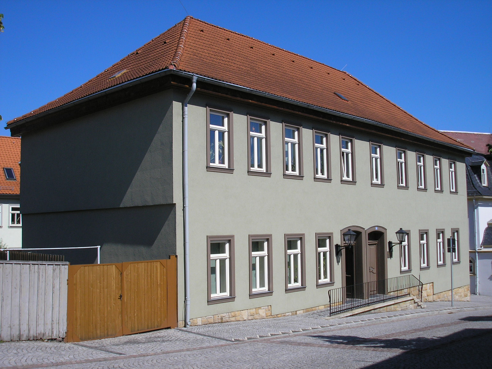 Das alte Schulgebäude der Stadt Ilmenau (Thüringen) am Topfmarkt. Bis in die 1870er-Jahre wurden hier die Kinder der Stadt unterrichtet.